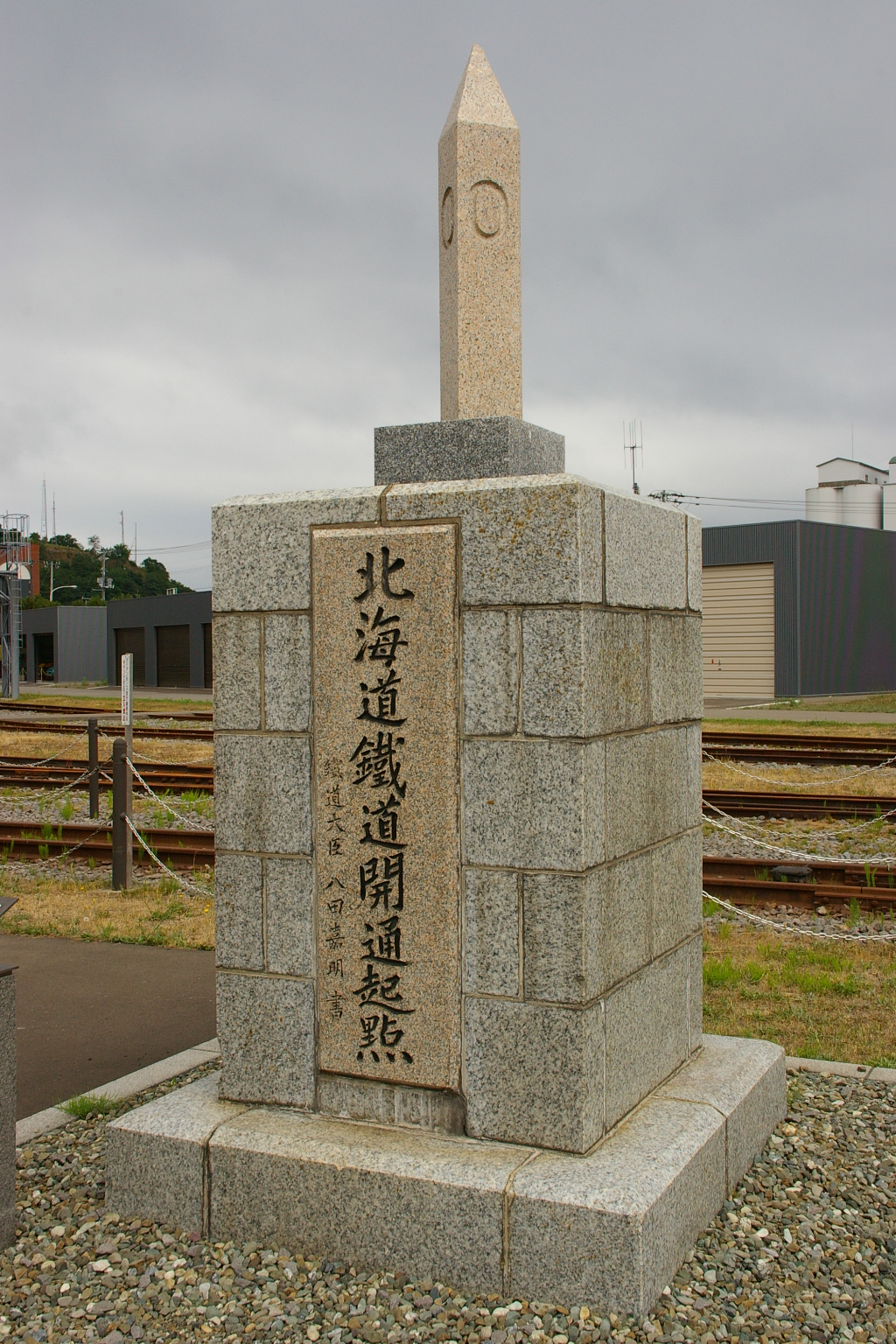 Hokkaido railway Zero mile post in Otaru synthesis museum.